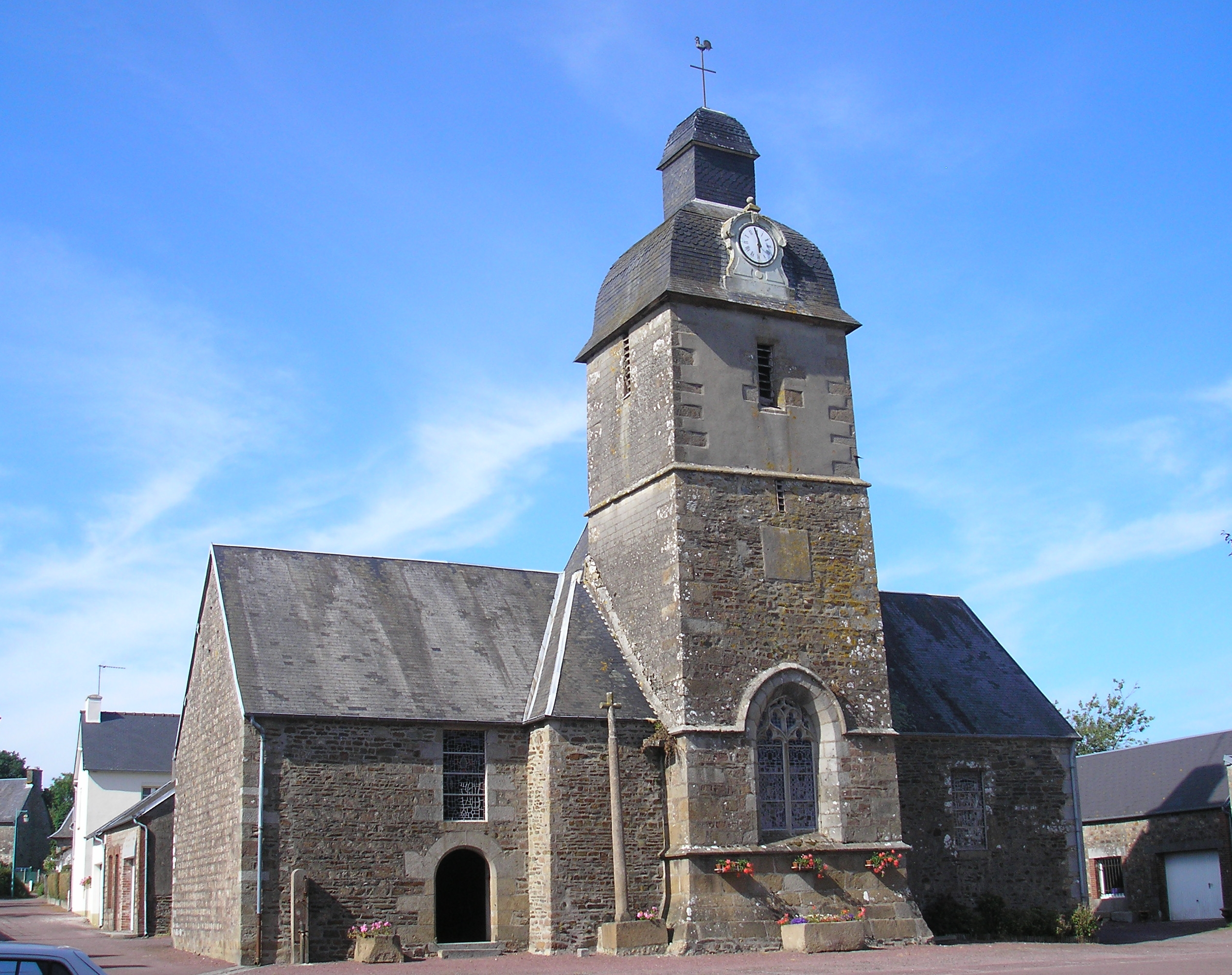 Montbray (Normandie, France). La chapelle Saint-Pierre.